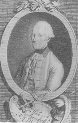 Cornelius Hermann von Ayrenhoff